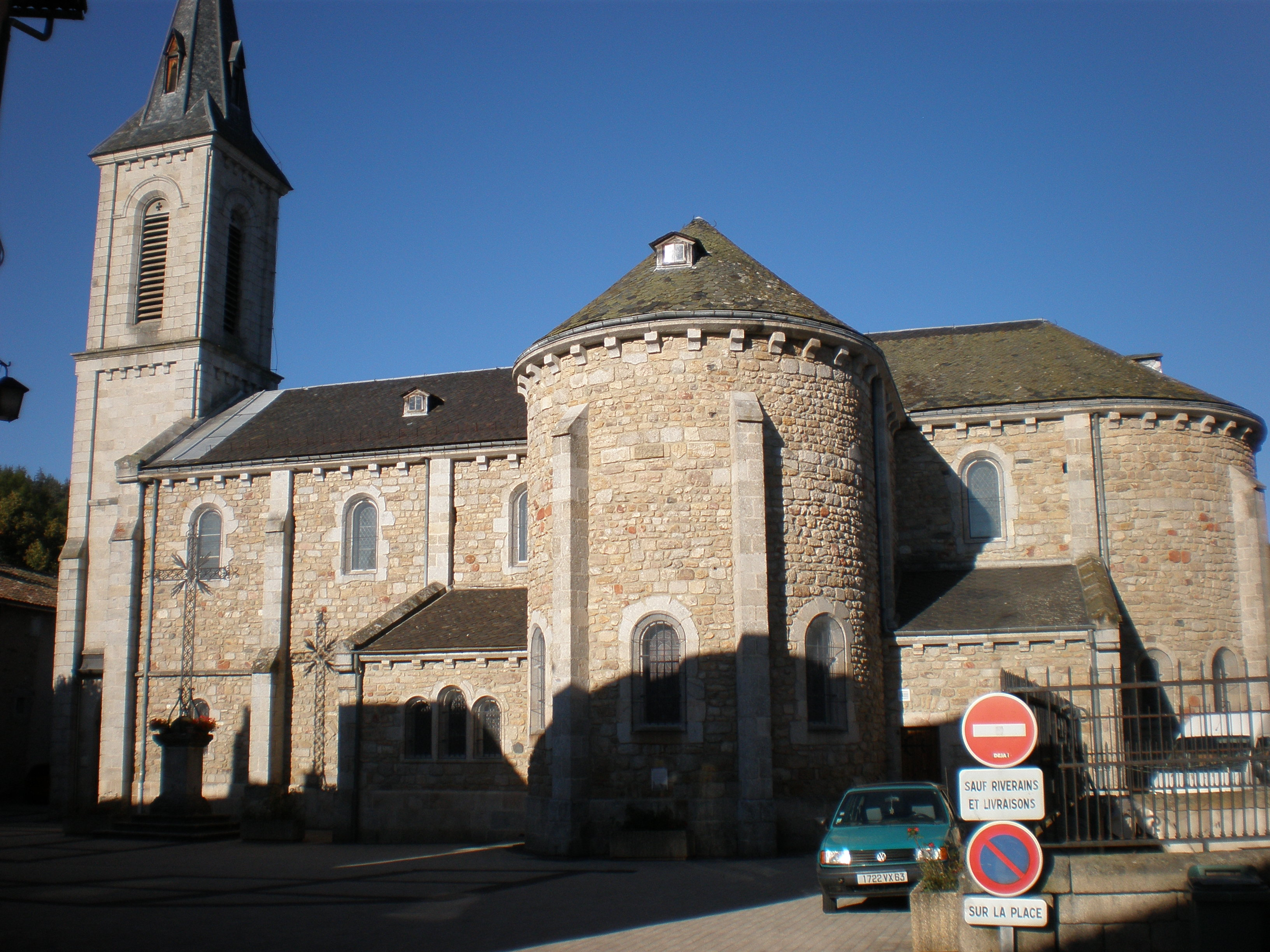 église paroissiale Saint-Hippolyte du Malzieu-Ville (Lozère)